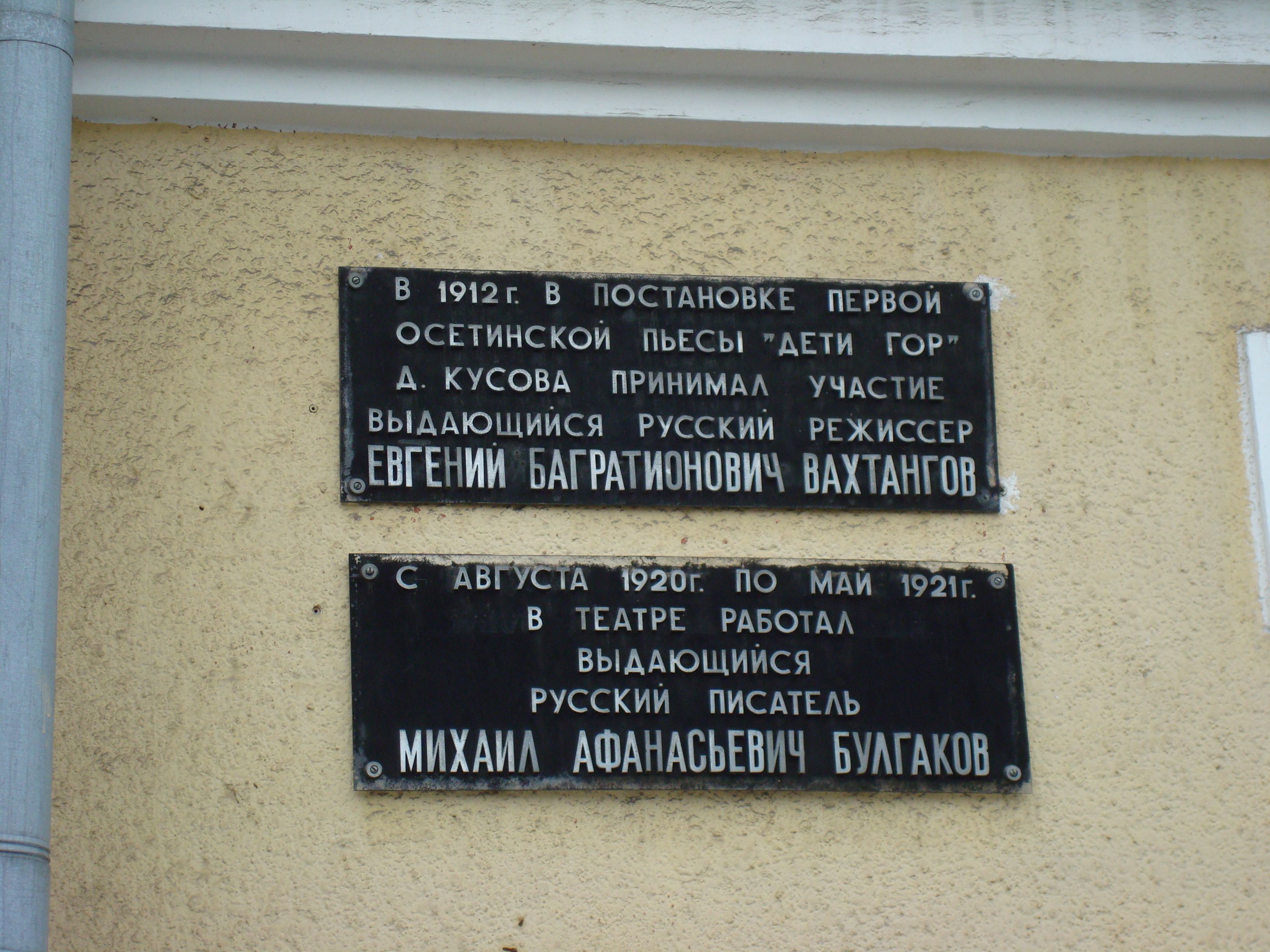 Мемориальная доска Михаилу Булгакову и Евгению Вахтангову во Владикавказе